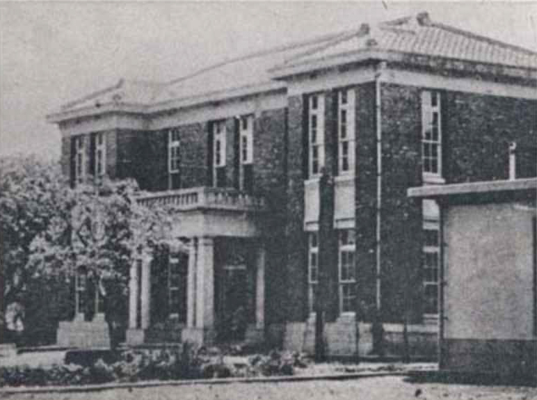 中文（台灣）: 龜山庄役場，已拆除